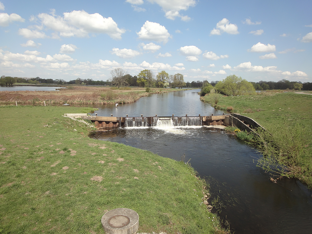 Die Ems im Naturschutzgebiet Steinhorster Becken